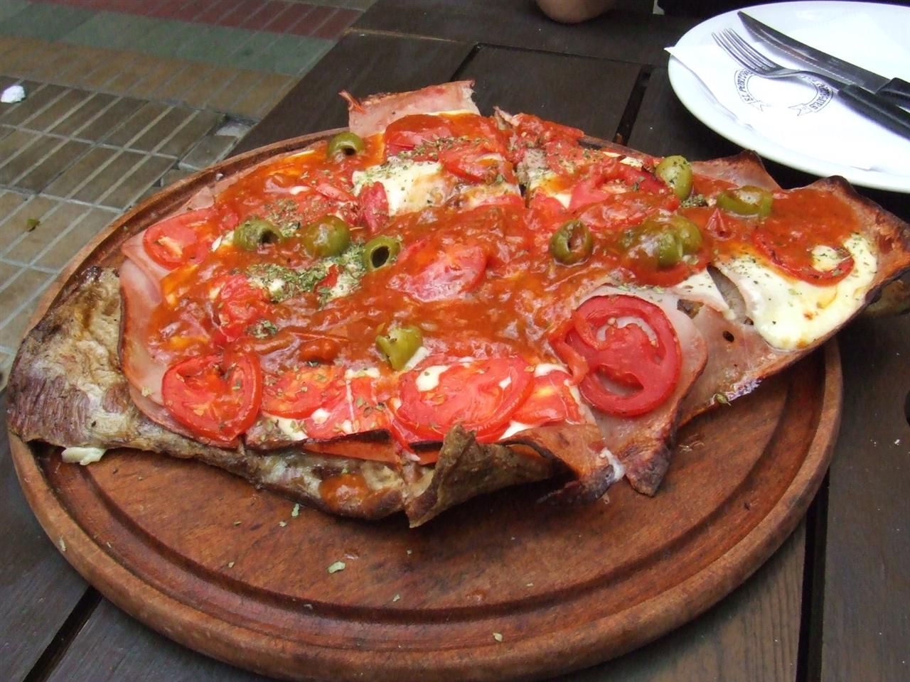 Pizza Matambre